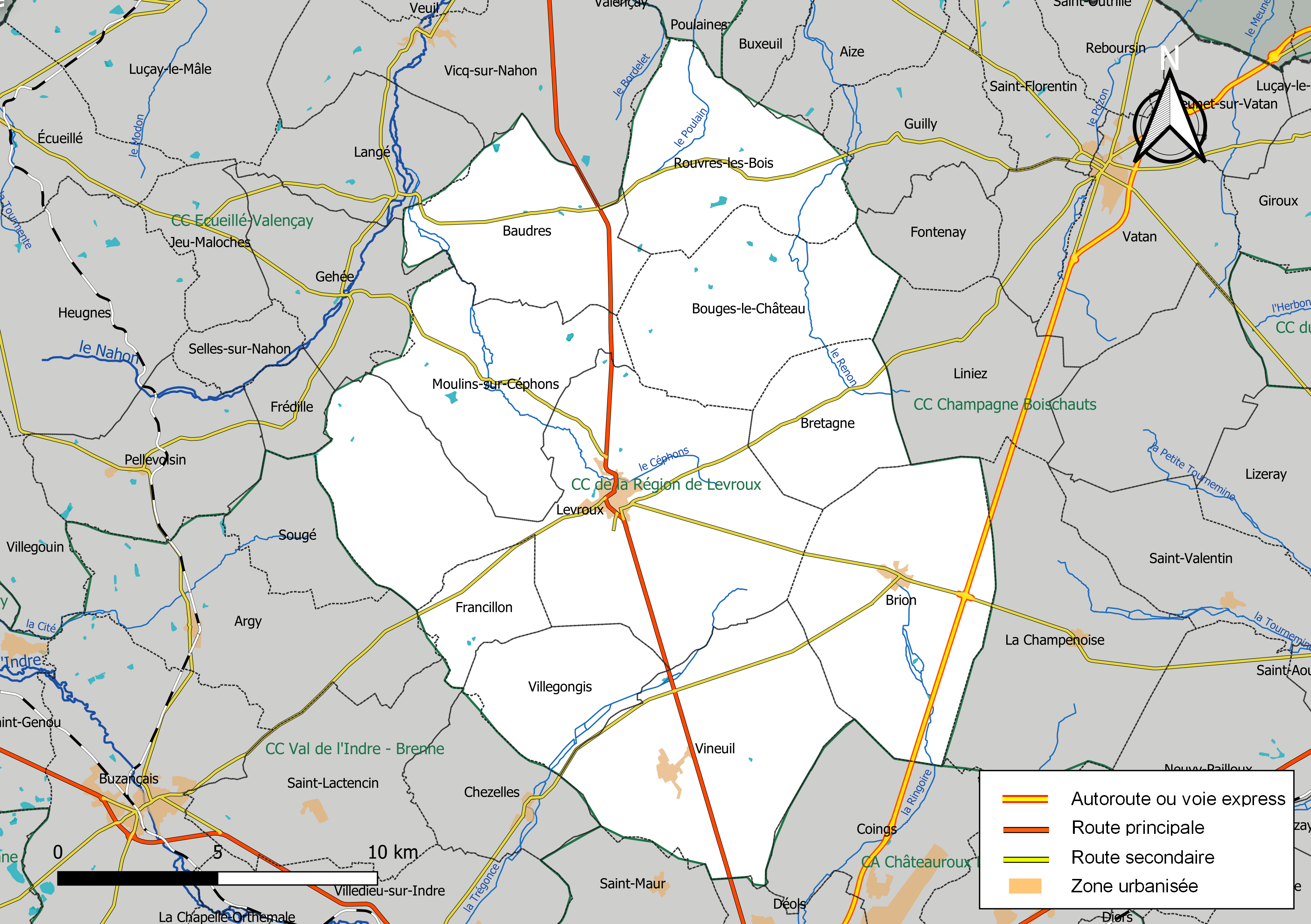 Carte de la communauté de communes de la Région de Levroux, département de l'Indre, France. Composition au 1er janvier 2019.